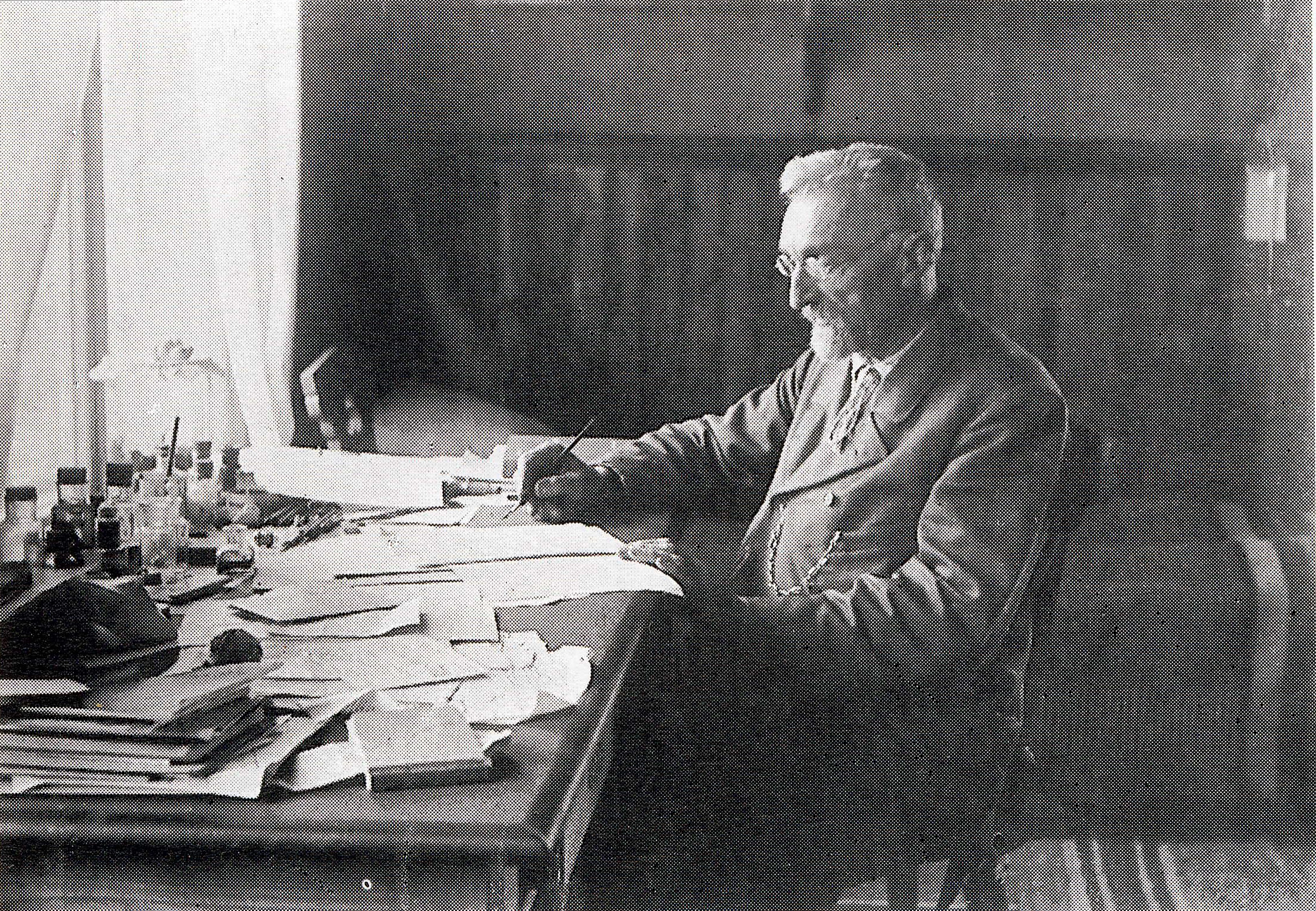 Eläintieteen professori J. A. Palmén (1845–1919) yksityislaboratoriossaan Tvärminnen tutkimusasemalla.